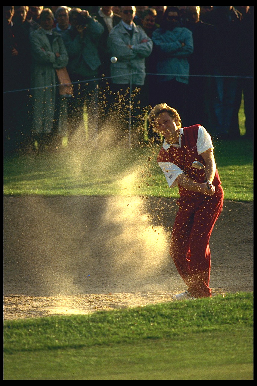 1992 Honda Open Gut Kaden/Schleswig-Holstein